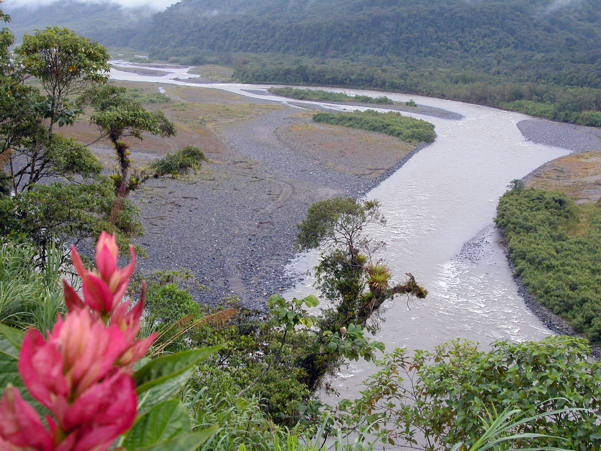 Río Pastaza